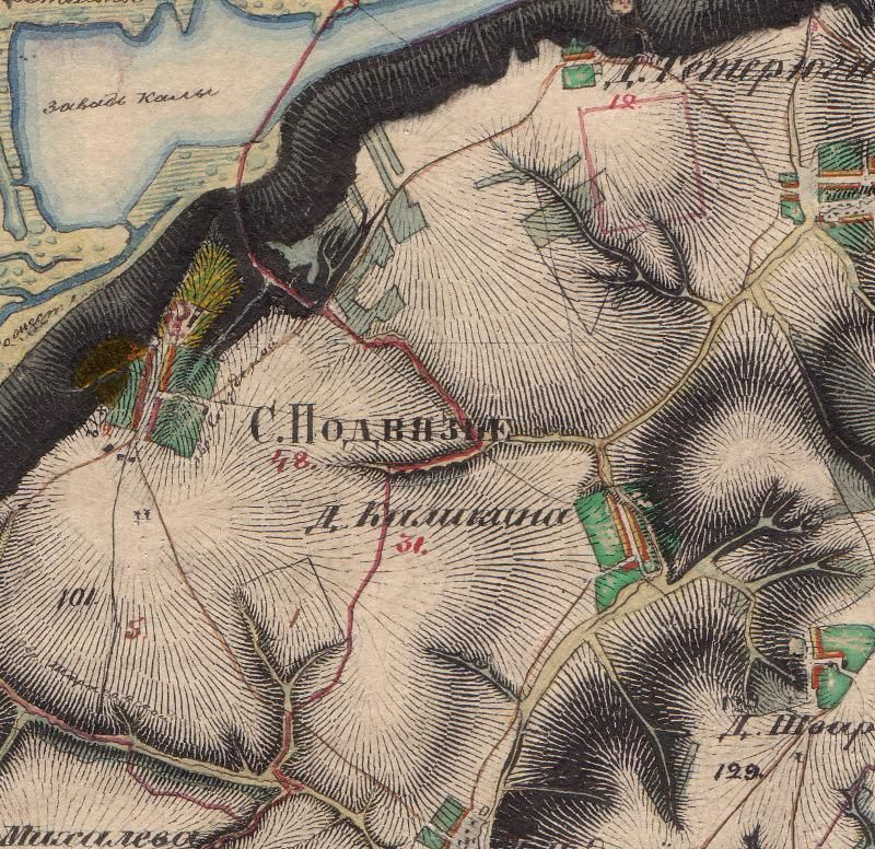 Карта села подвязья